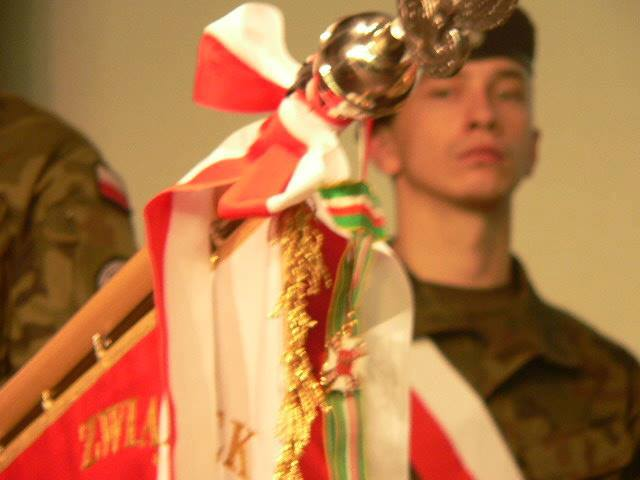 Sztandar ZS"S" RP udekorowany Krzyżem Komandorskim "Weteranom WOP, funkcjonariuszom rezerwy Straży Granicznej i ich sympatykom, który został nadany ZS"S" RP